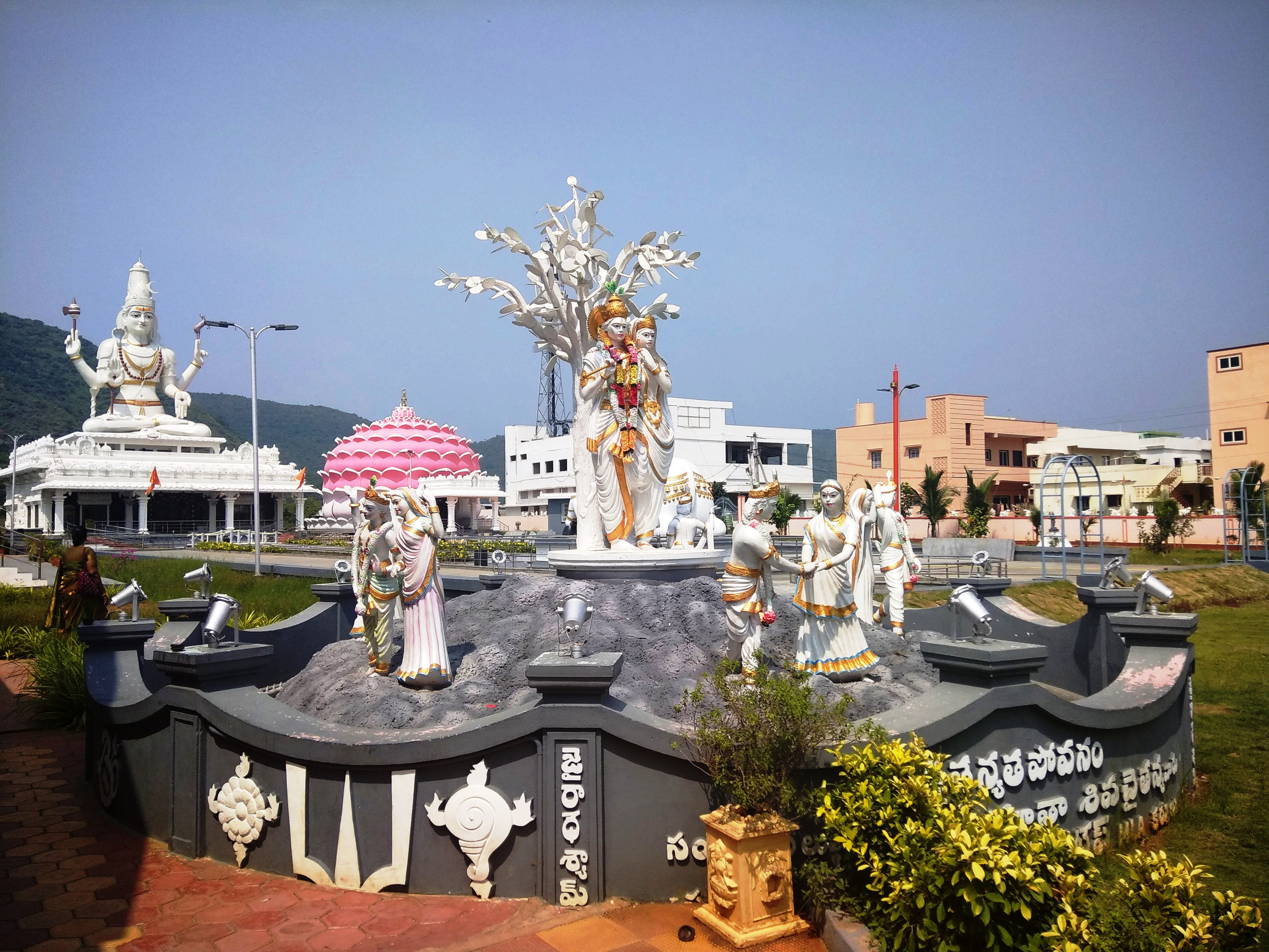 రాద కృష్ణ ల విగ్రహం